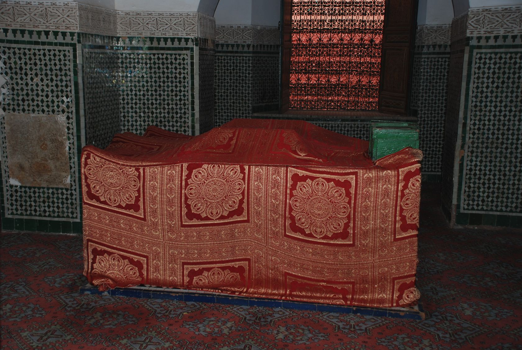 Marrakesch, Heiligengrab von Cadi Ayyad Ben Moussa